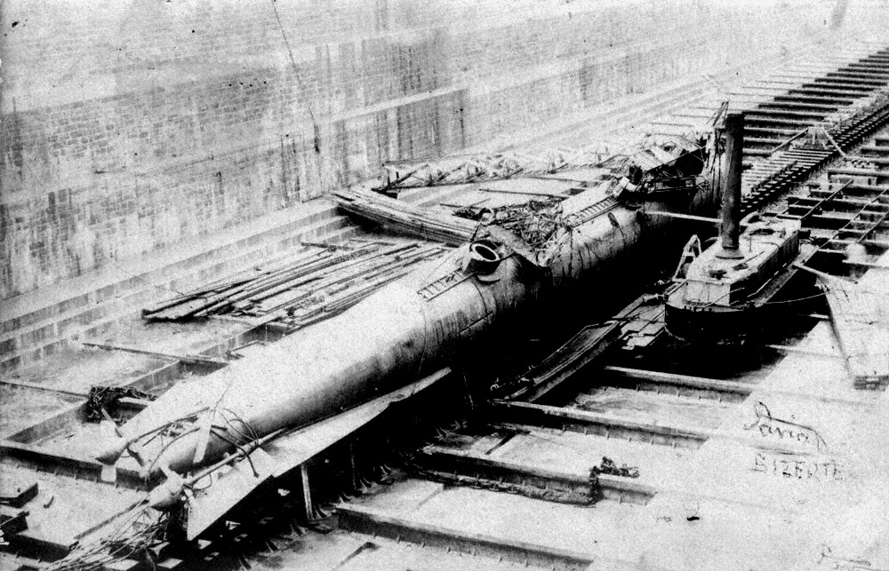 Le sous-marin Lutin déposé au fond d'un bassin de radoub à Sidi-Abdallah en octobre 1906